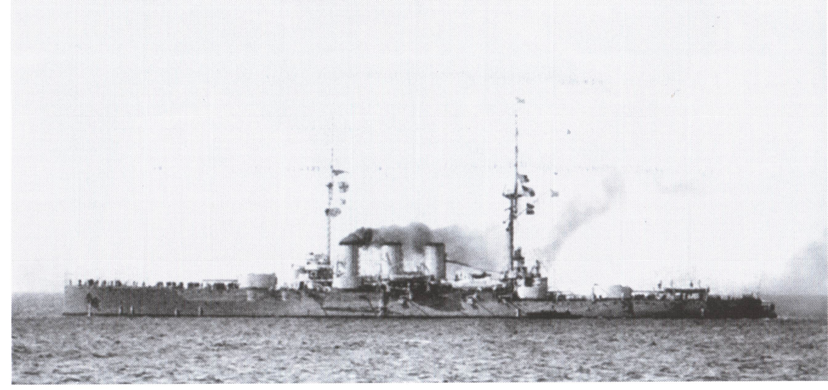 Броненосный крейсер "Рюрик", которым ходил в боевые походы капитан 1-го ранга А.В. Колчак в 1914-1915 гг.